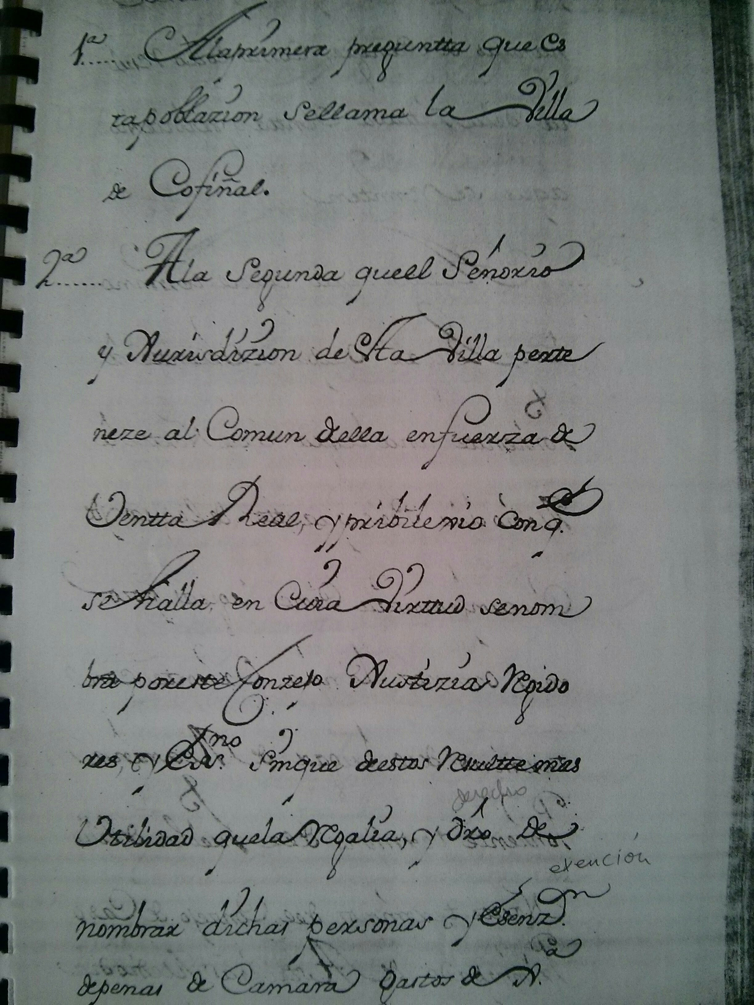 Pagina del Catastro Marques de la Ensenada dedicado a Cofiñal